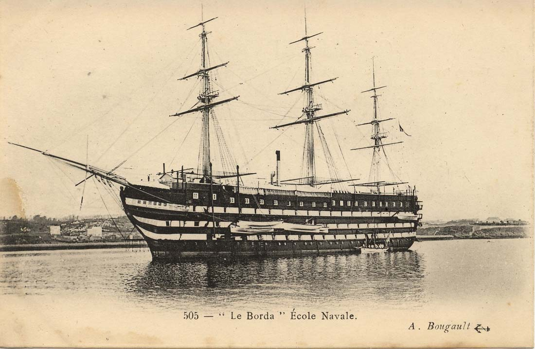 “ Le Borda ” École Navale